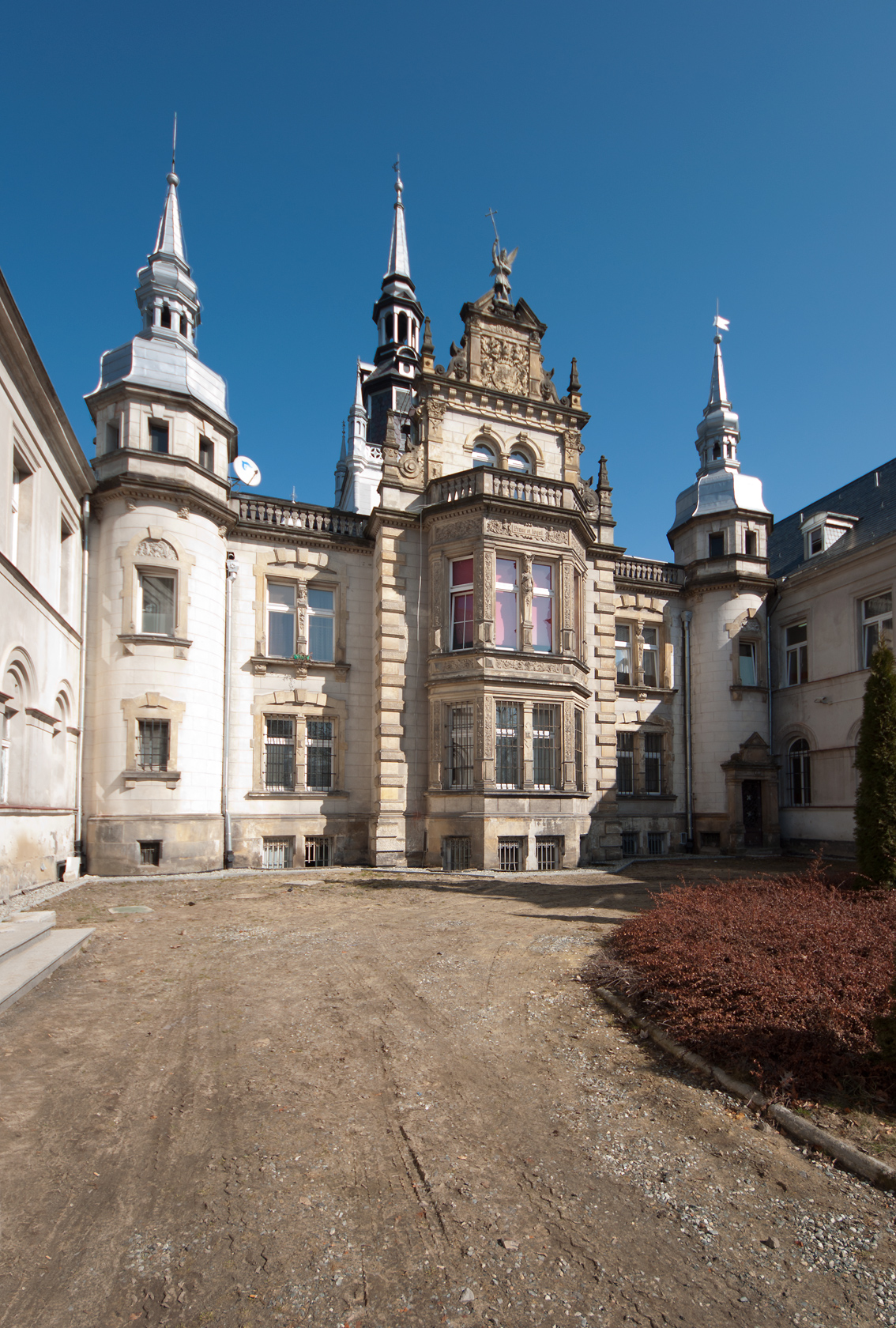 zespół pałacowy Pałac, mur., XVIII, 1879 Czworak, mur., XVIII, XIX/XX Młyn wodny, mur.-szach., 1763 Stajnia, mur., 1 poł. XIX Tułowice, Tułowice 05.1965.